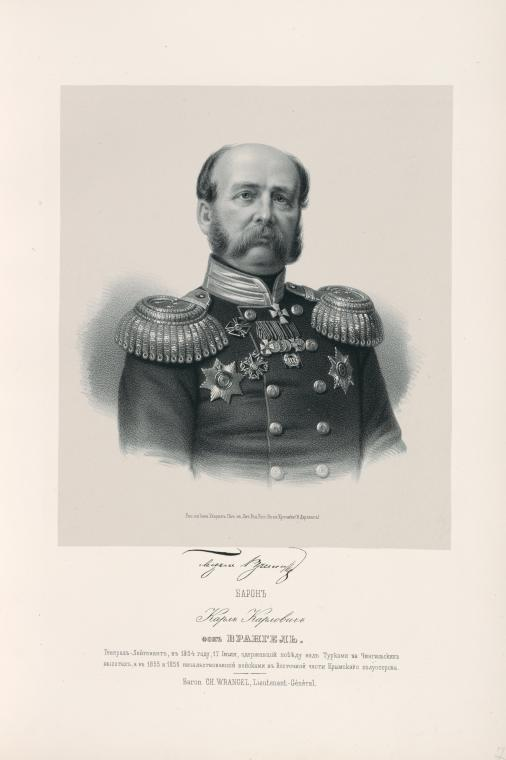 генерал К. К. Врангель